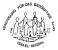 Das aktuelle Deutsches Logo der Vereinigung für das Bedürftige Kind in Israel